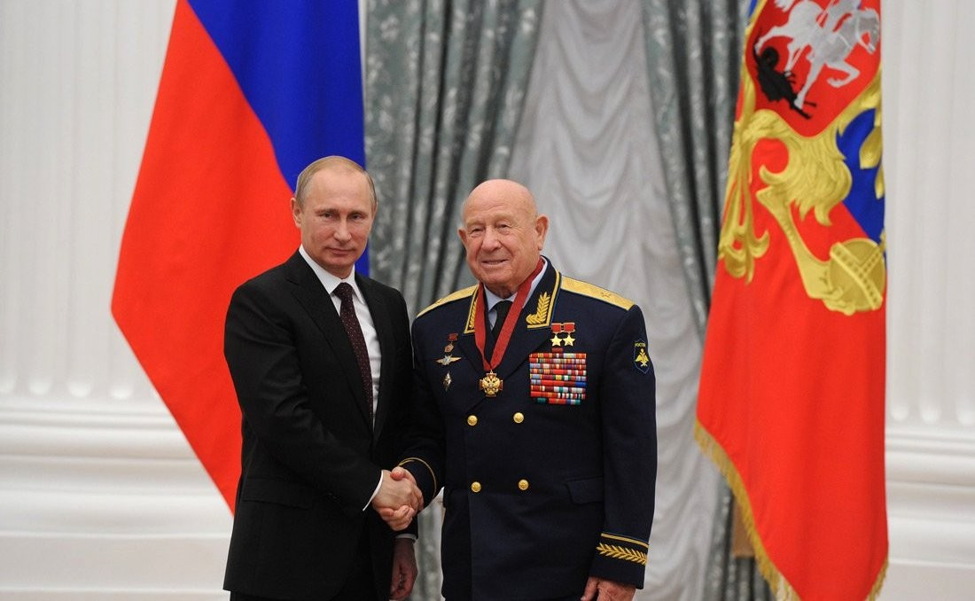 Орденом «За заслуги перед Отечеством» III степени награждён лётчик-космонавт СССР Алексей Леонов